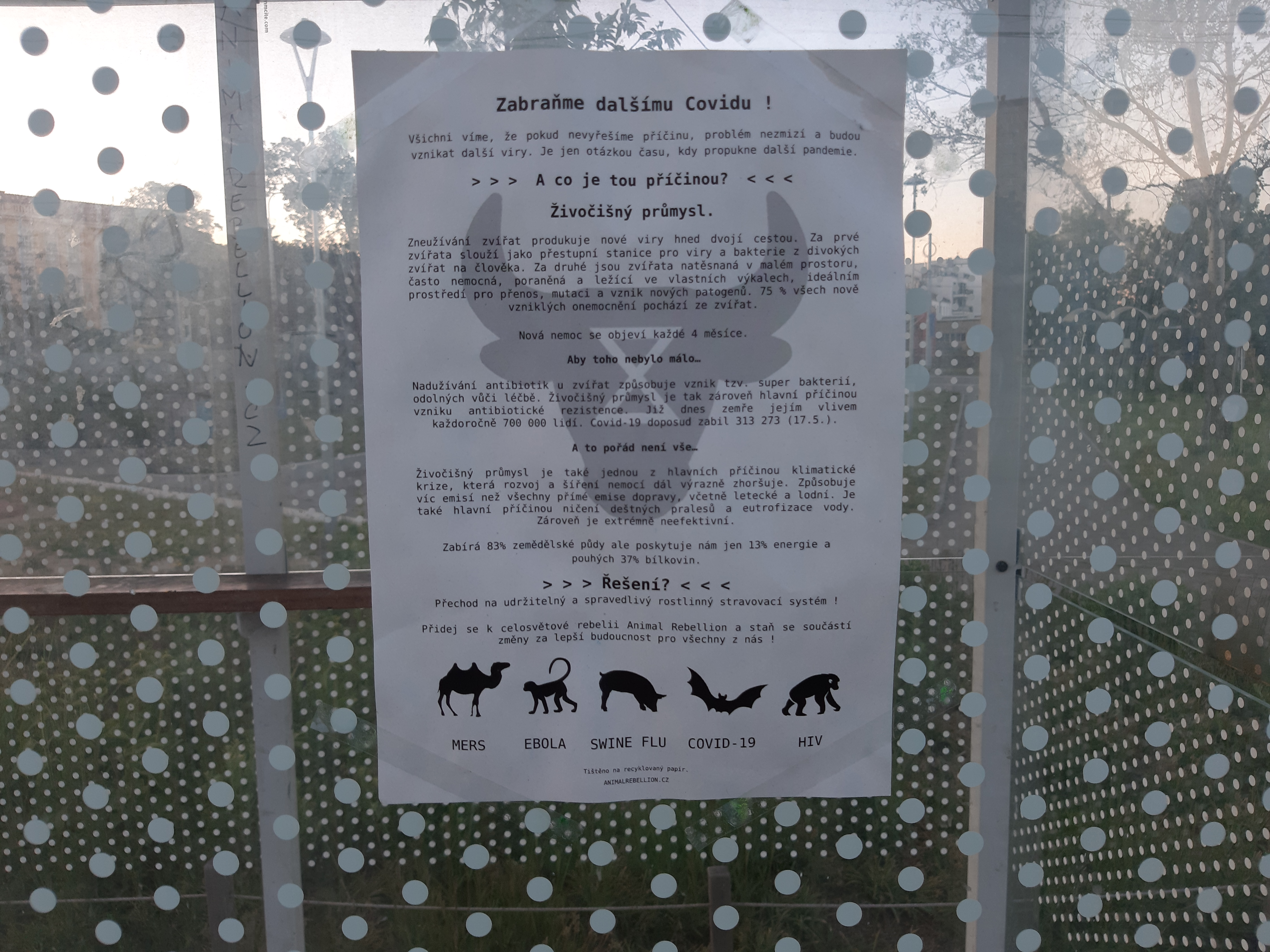 Veganské organizace dávají do souvislosti COVID s produkcí masa pro lidskou spotřebu.